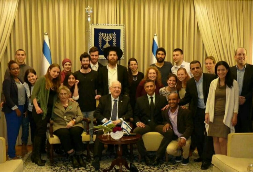 קנר (יושב מימין לנשיא) מציג לנשיא המדינה את פעילות מרכז הינם. הקרדיט לצילום: מרכז הינם